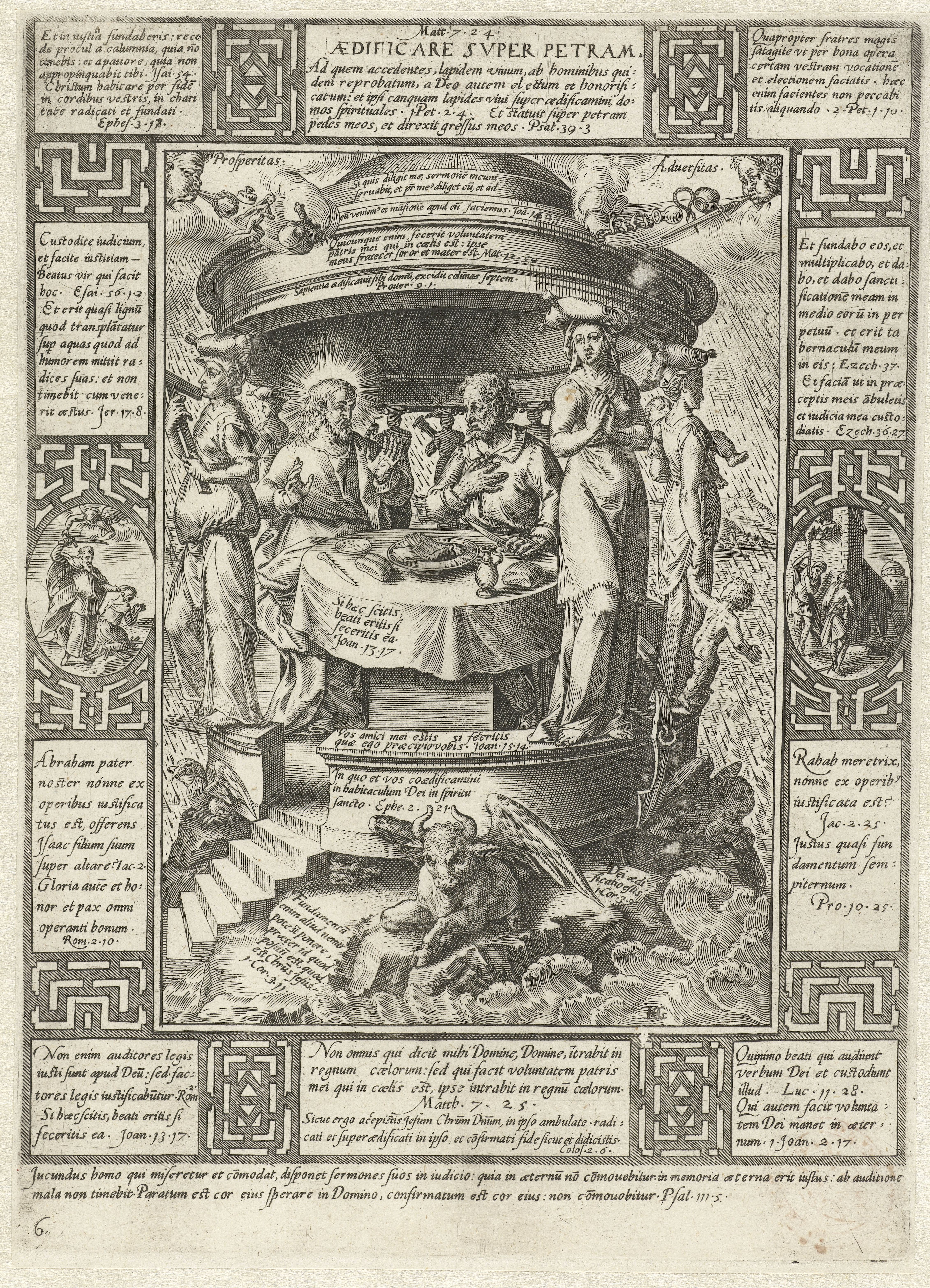 IdentificatieTitel(s): Het huis gebouwd op een rotsAedificare super petram (titel op object)Allegorieën van het christelijke geloof (serietitel)Objecttype: prent Serienummer: 6/10Objectnummer: RP-P-OB-10.077Catalogusreferentie: The Illustrated Bartsch 70-2(2)Hollstein Dutch 71New Hollstein Dutch 64-2(2)Opschriften / Merken: monogram, rechtsonder, gegraveerd: ‘HG’verzamelaarsmerk, verso linksonder, gestempeld: Lugt 240Omschrijving: Serie van tien (oorspronkelijk twaalf) allegorieën van het christelijke geloof. Elk van de allegorieën bestaat uit een centrale voorstelling met daaromheen een omlijsting Waar: in citaten uit de bijbel gecombineerd zijn met de verbeelding van bepaalde gebeurtenissen uit de bijbel. In de marge onderaan twee regels Latijn en het nummer 6.VervaardigingVervaardiger: prentmaker: Hendrick Goltzius (vermeld op object)naar eigen ontwerp van: Hendrick Goltziusuitgever: Hendrick Hondius (I) (mogelijk)Plaats vervaardiging: prentmaker: Haarlemuitgever: Den HaagDatering: 1598 - 1604Fysieke kenmerken: gravureMateriaal: papier Techniek: graveren (drukprocedé)Afmetingen: plaatrand: h 258 mm × b 186 mmOnderwerpWat: house built upon a rock; house built upon sand ~ doctrine of Christ on love, etc. (Matthew 7:24-27; Luke 6:47-49)Verwerving en rechtenVerwerving: overdracht van beheer 1816Copyright: Publiek domein